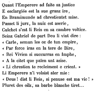 Description : derniers vers (v. 3988-4001, la dernière phrase, « Ci falt la Geste que Turoldus declinet », n'est pas reprise vu son caractère métalittéraire) de la Chanson de Roland. Source : La Chanson de Roland, éd. par Léon Gautier, Tours, A. Mame et fils, 1872, d'après le microfilm de la BNF (cote : NUMM-102947), téléchargé sur Gallica. Licence